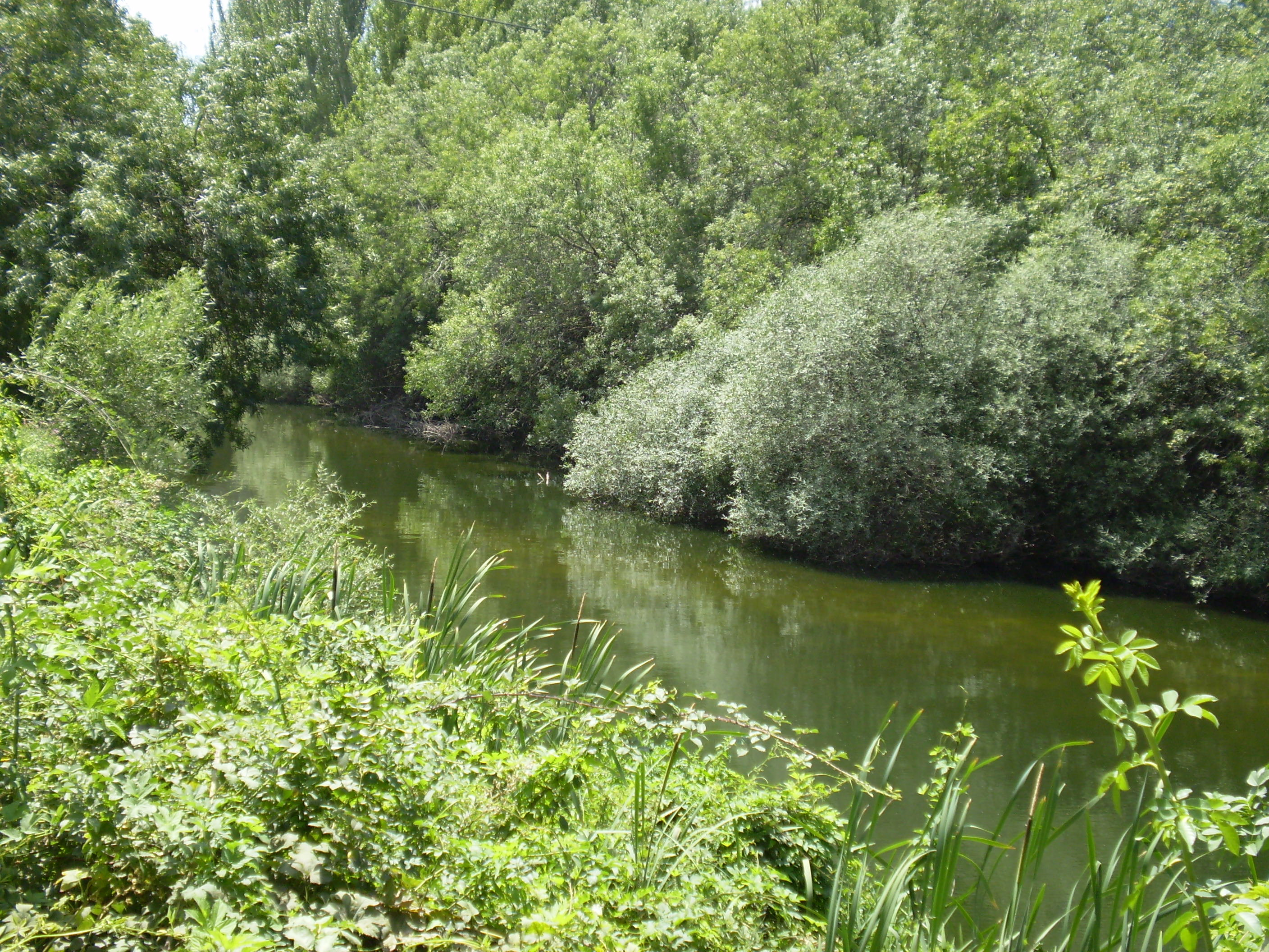 Río Guadarrama. Comunidad de Madrid, Spain